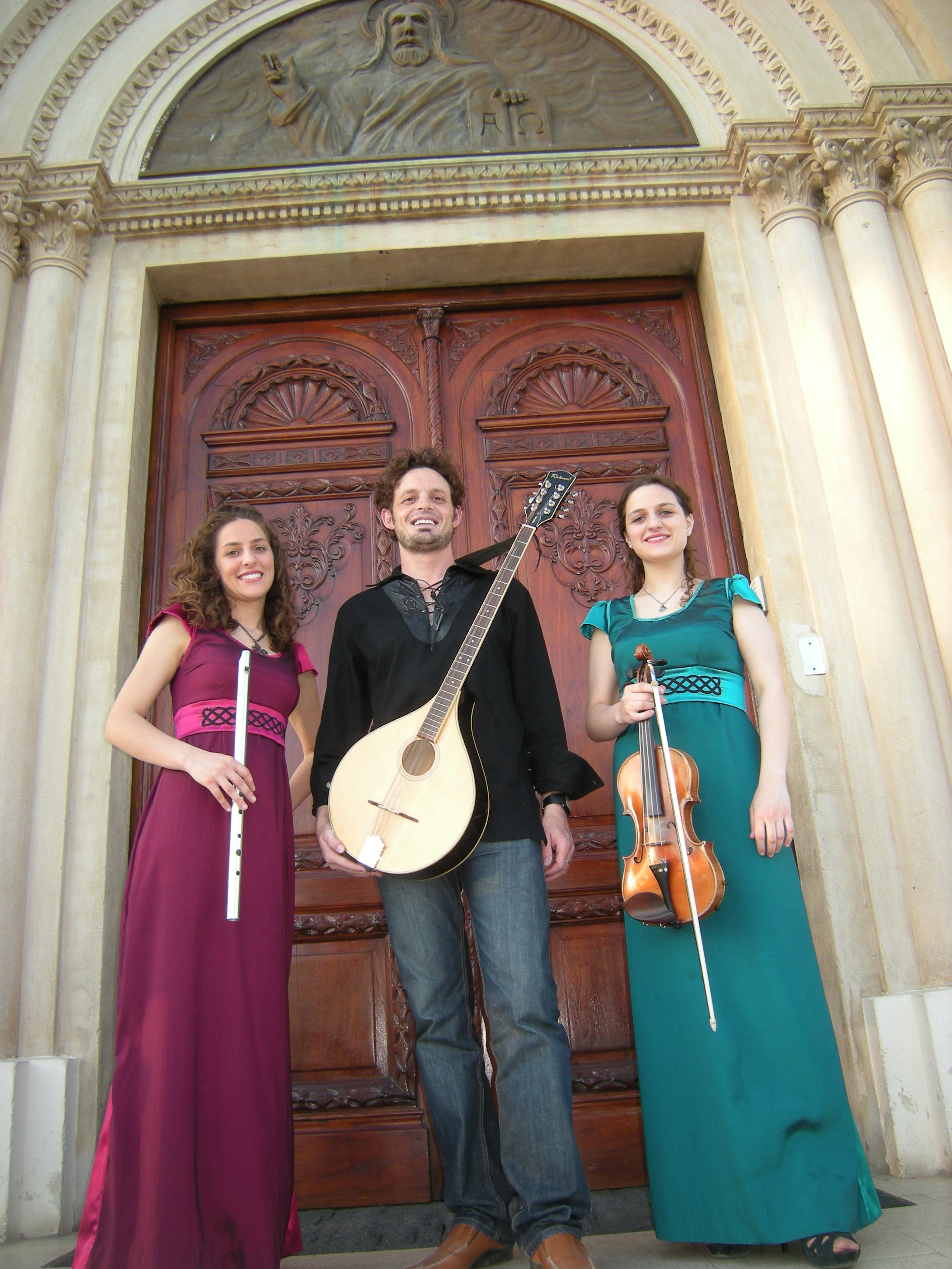 Feria Medieval "Córdoba Medieval"